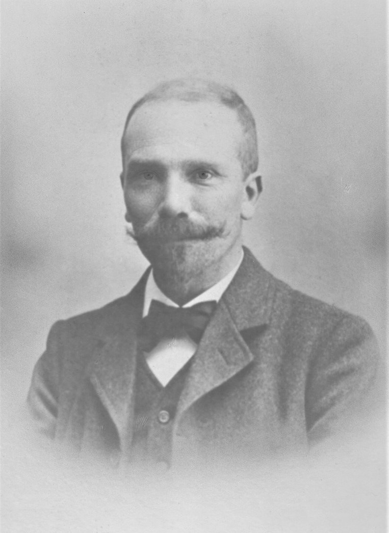 Christian Ludvig Johannesen (1862–1935), førstelærer ved Oreby skole per Sakskøbing.